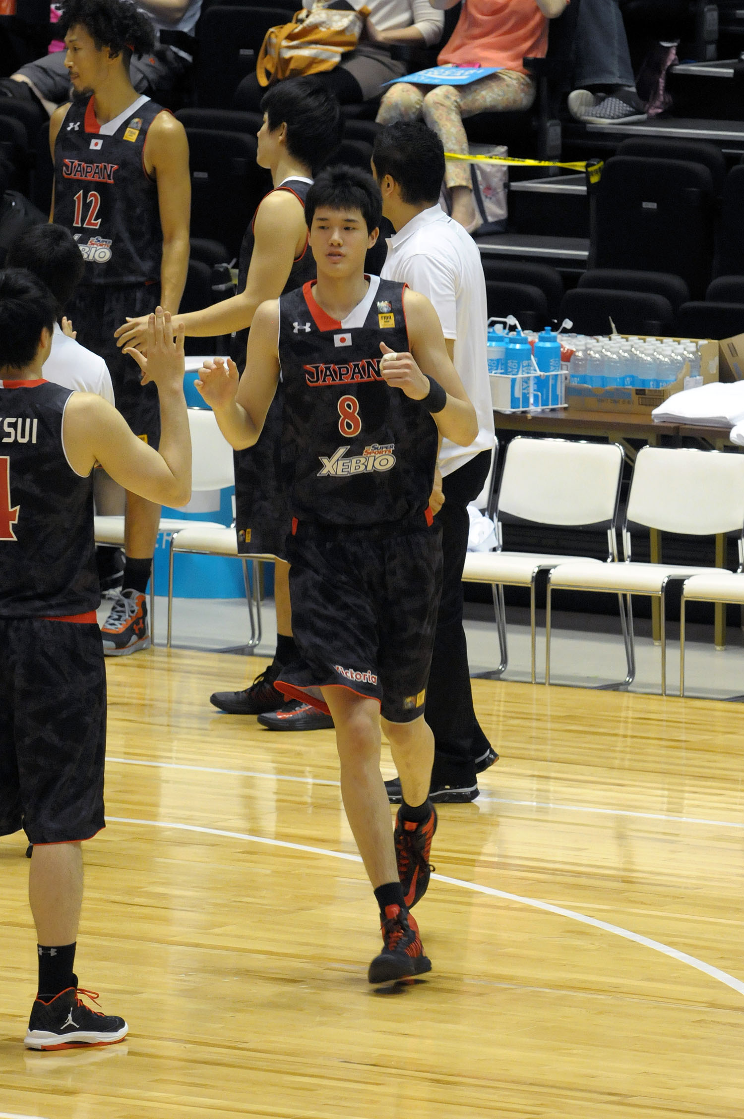 バスケットボール男子日本代表、渡邊雄太選手。ゼビオアリーナ仙台で。